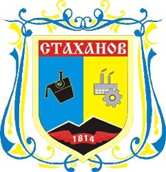 Герб міста Стаханова Луганської обалсті (Україна)